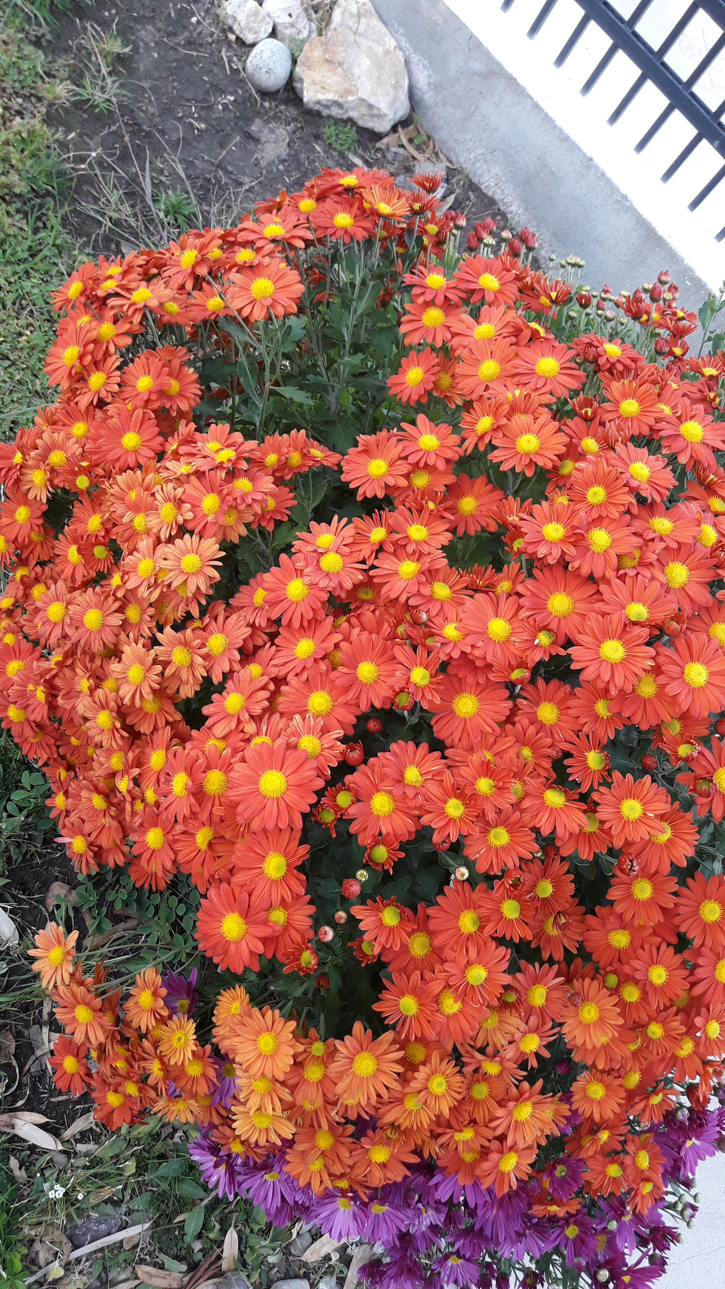 Plantas